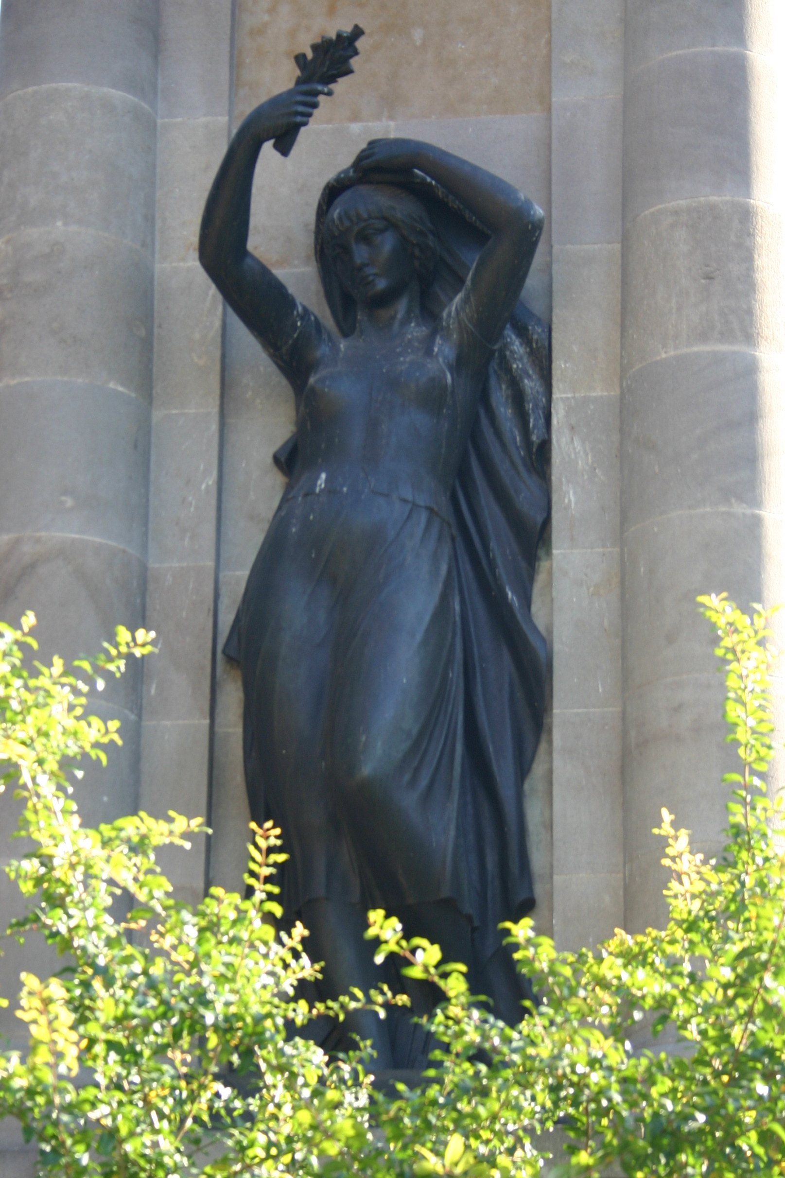 Montseny. Plaza Catalunya. Barcelona (Spain)